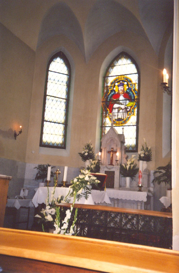 A dunakeszi Nepomuki Szent János (Lovaregyleti) kápolna oltár feletti festett üvegablaka